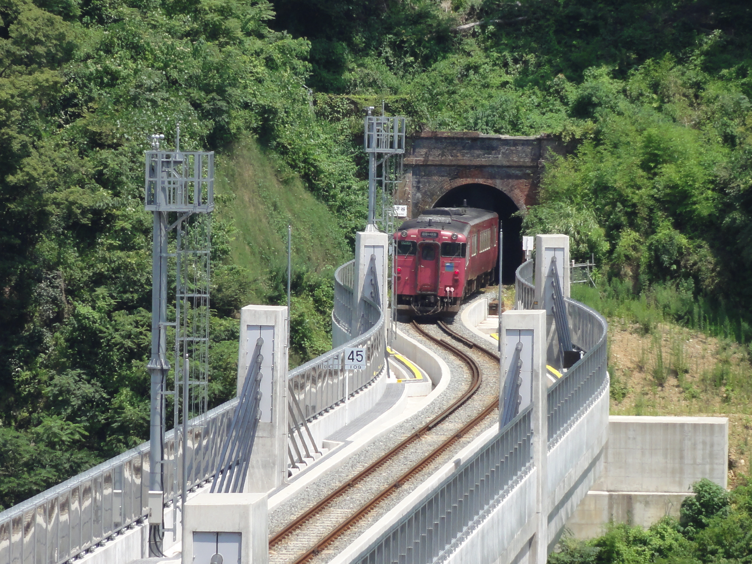 餘部駅の撮影ポイントより。Sカーブを収めたショット。